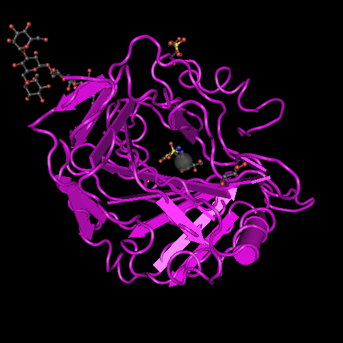 Estructura cristalina de la Anhidrasa Carbónica 14 humana, utilizando difracción de rayos X. Resolución 2 Å.